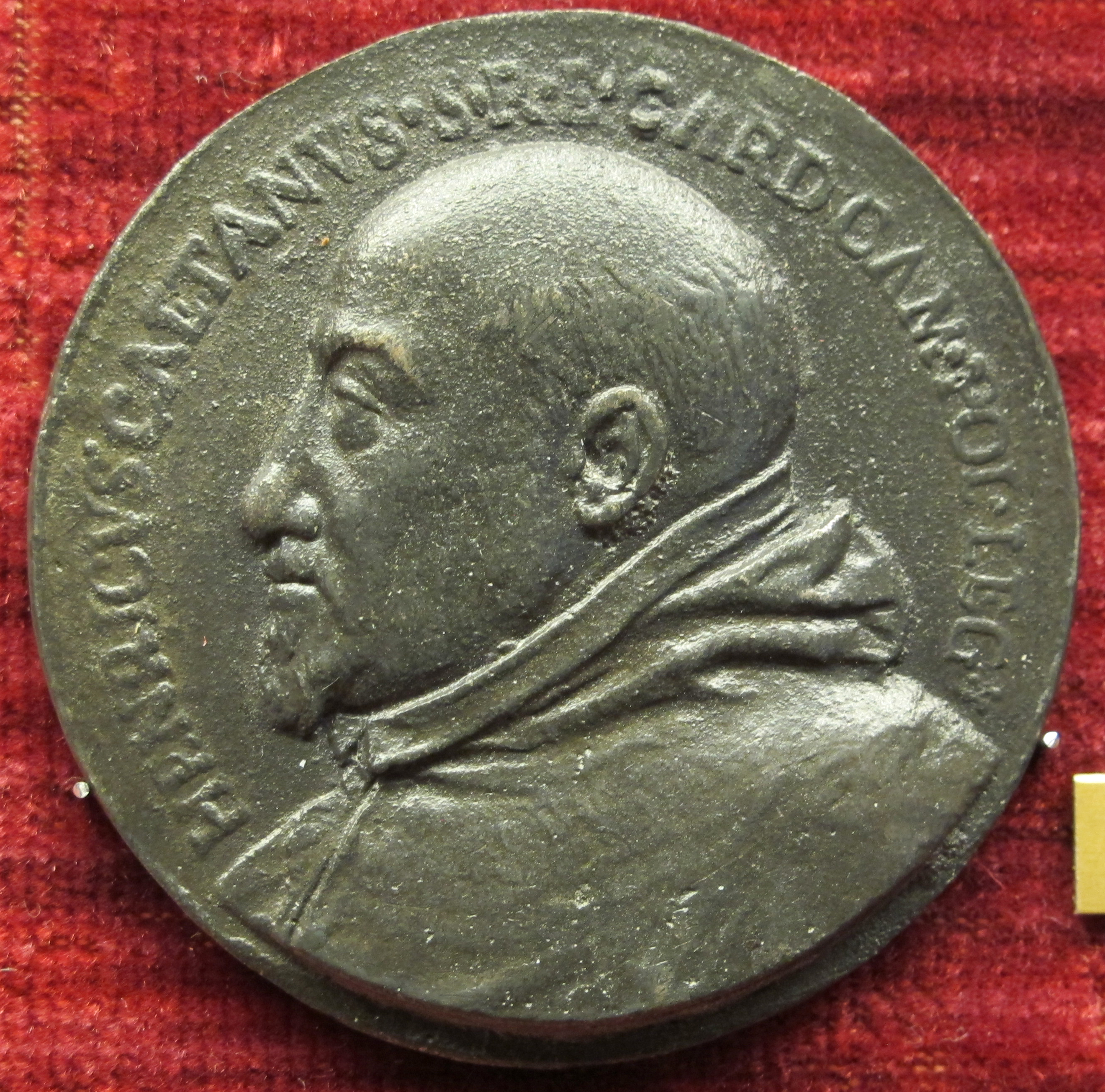 Enrico Caetani (1550-1599), medaglia di autore anonimo